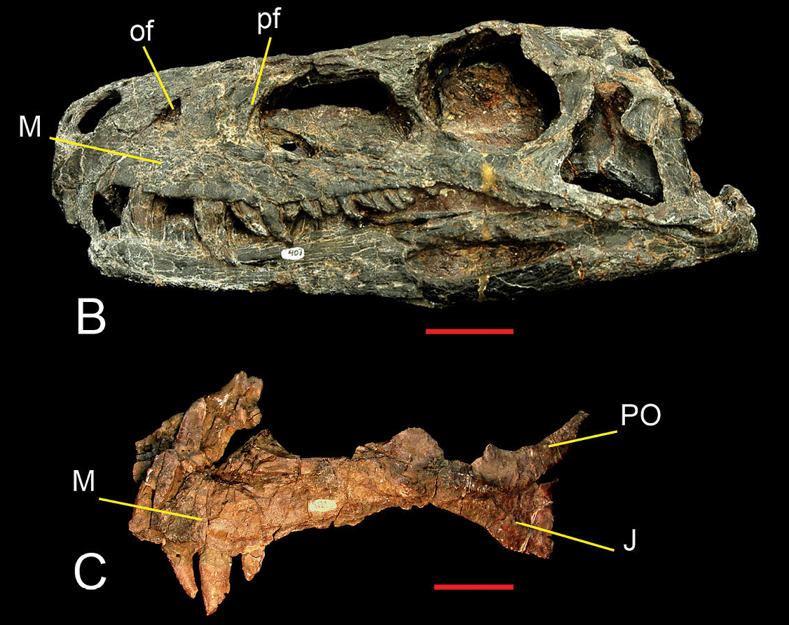 Skull of Herrerasaurus (PVSJ 407) in left lateral view (B) Left maxilla of Herrerasaurus (PVSJ 053) in lateral view (C) Abbreviations: af, antorbital fossa; dp, dorsal process; ip, internarial process; J, jugal; jp, jugal process; M, maxilla; of, oval fenestra; pf, promaxillary fenestra; PO, postorbital. Scale bars equals 5 cm.